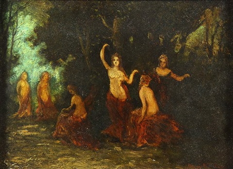 Ninfe, olio su tavola, 24.8 x 33 cm., coll. privata